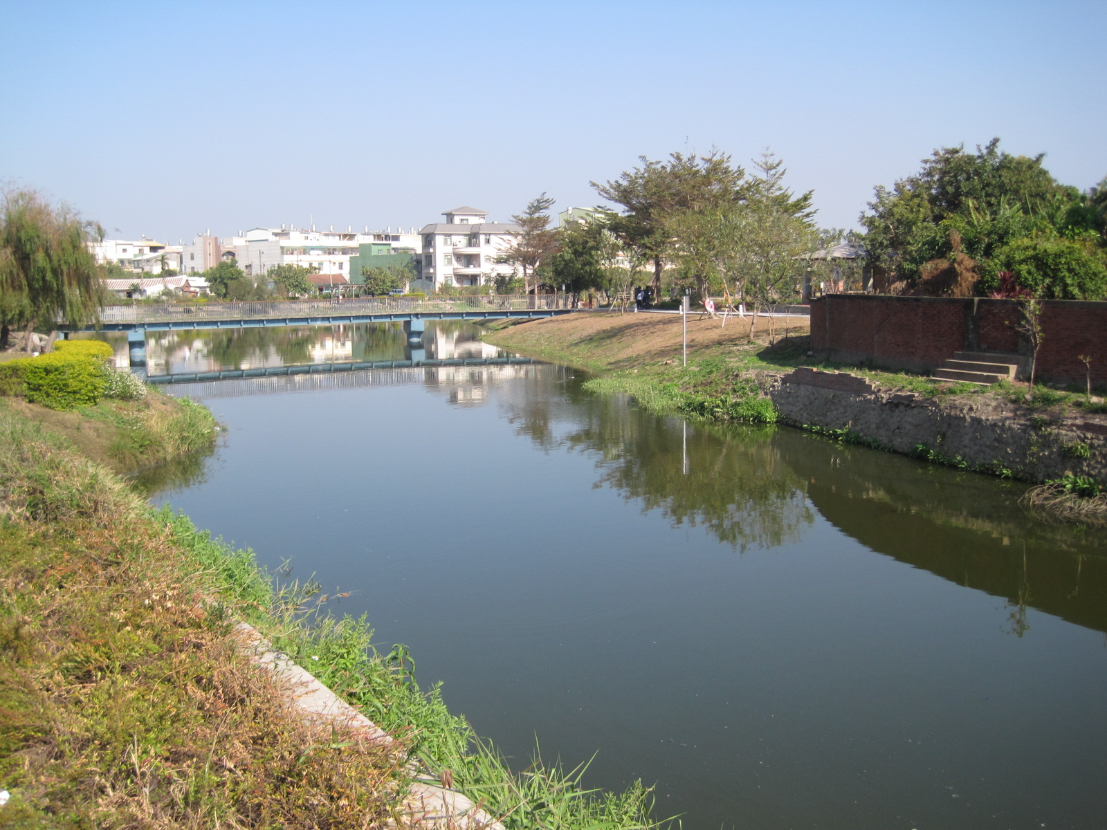 臺南鹽水港港道剩餘部份